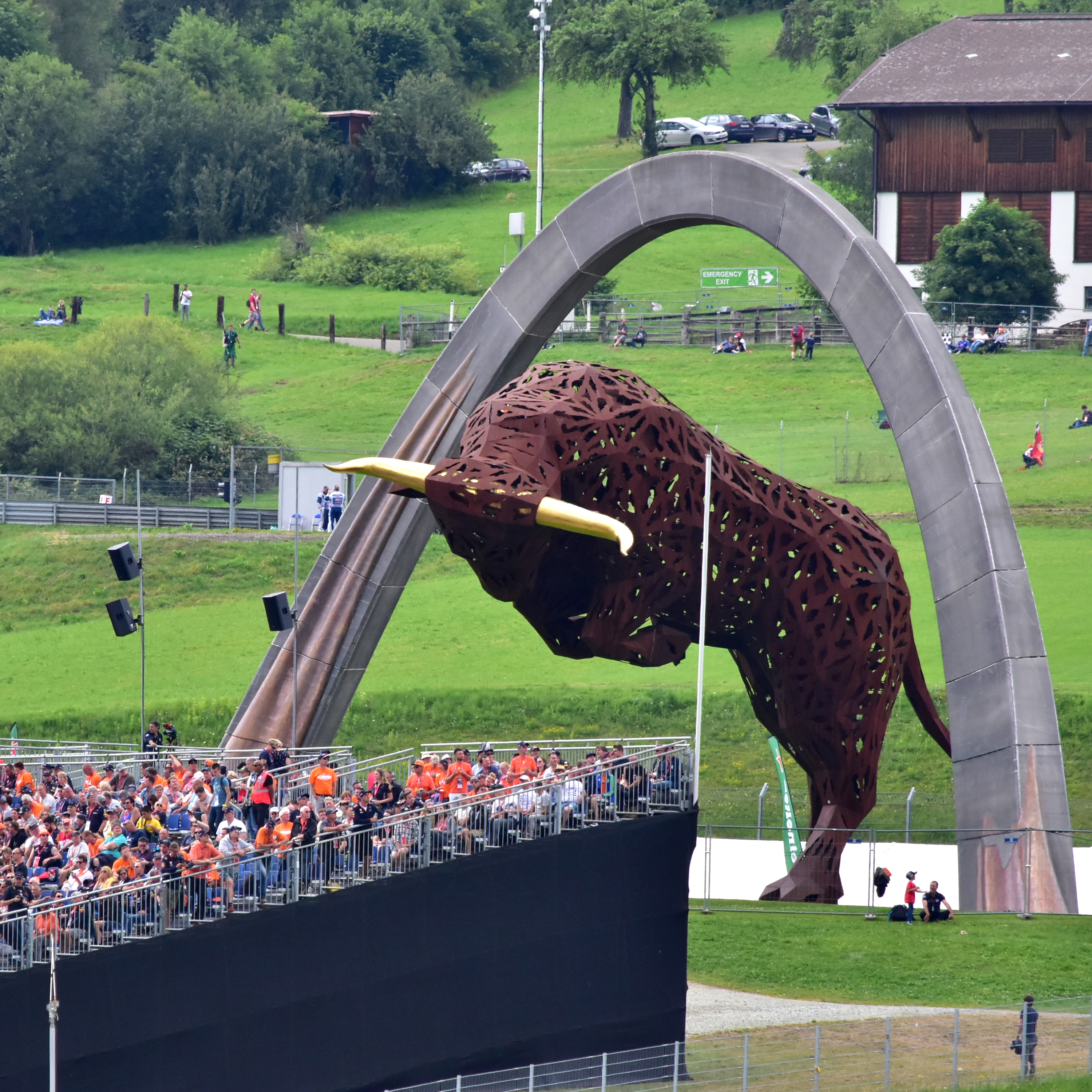 2018 Austrian Grand Prix.